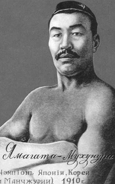 Хаджимукан Мунайтпасов, a Kazakh wrestler